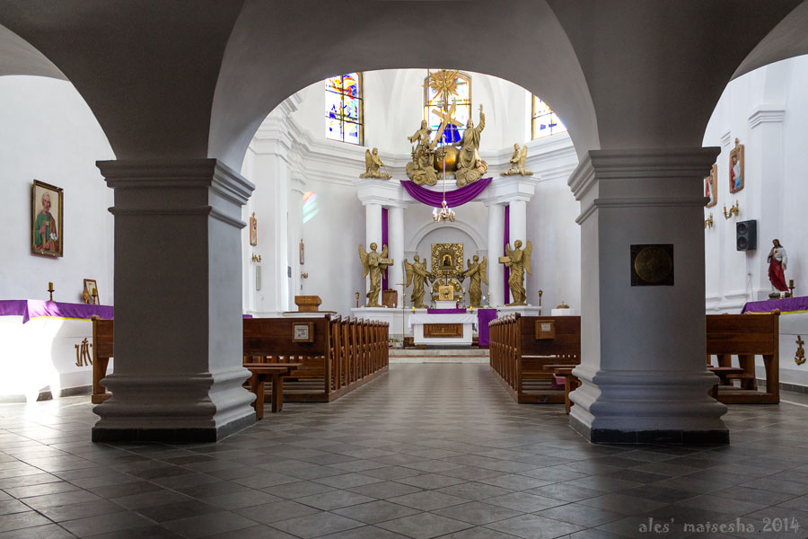 Мазыр. Касцёл Святога Міхала Арханёла і кляштар цыстэрцыянак